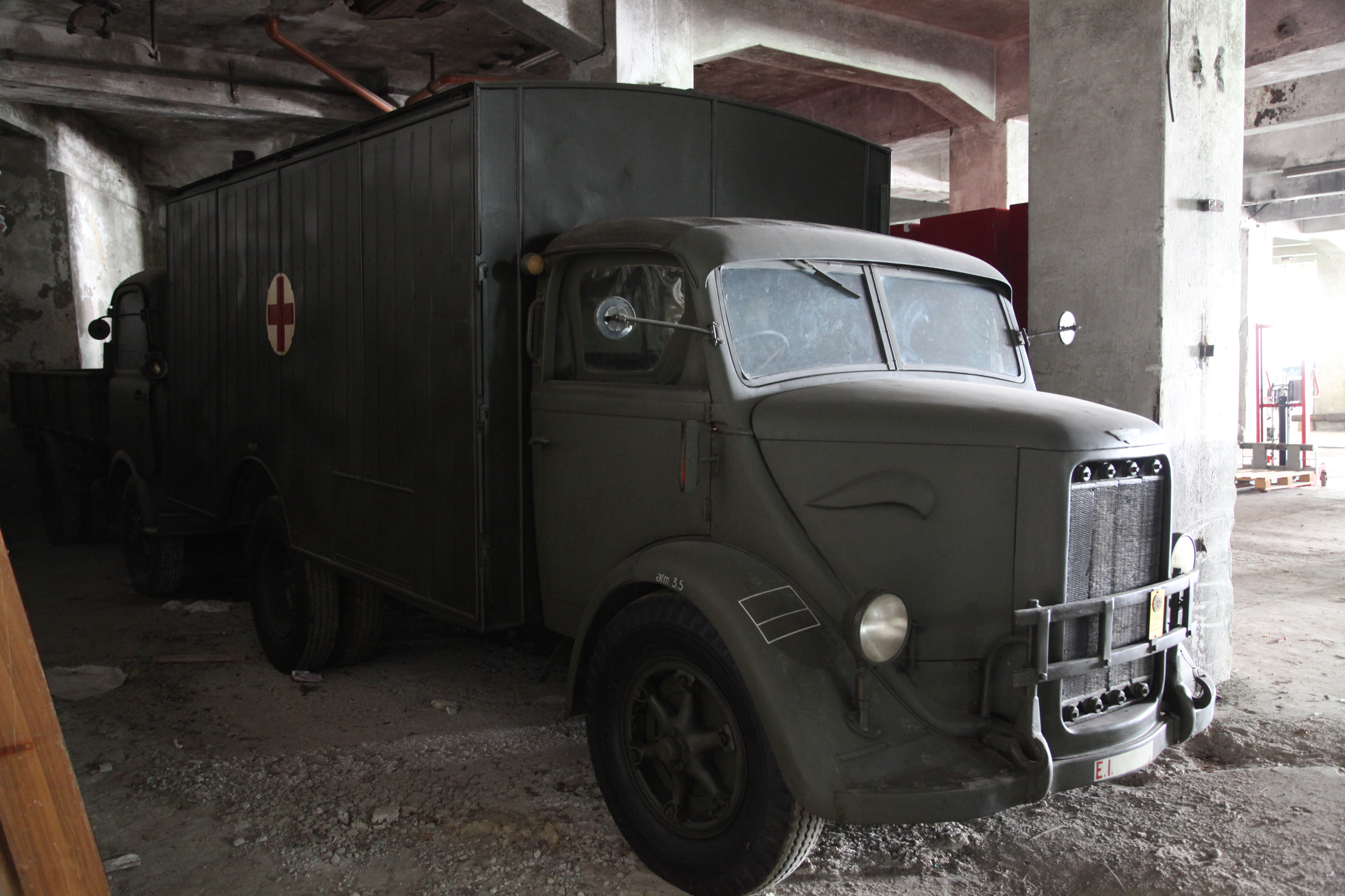 Autocarro Bianchi Miles delle collezioni del Museo Storico Italiano della Guerra